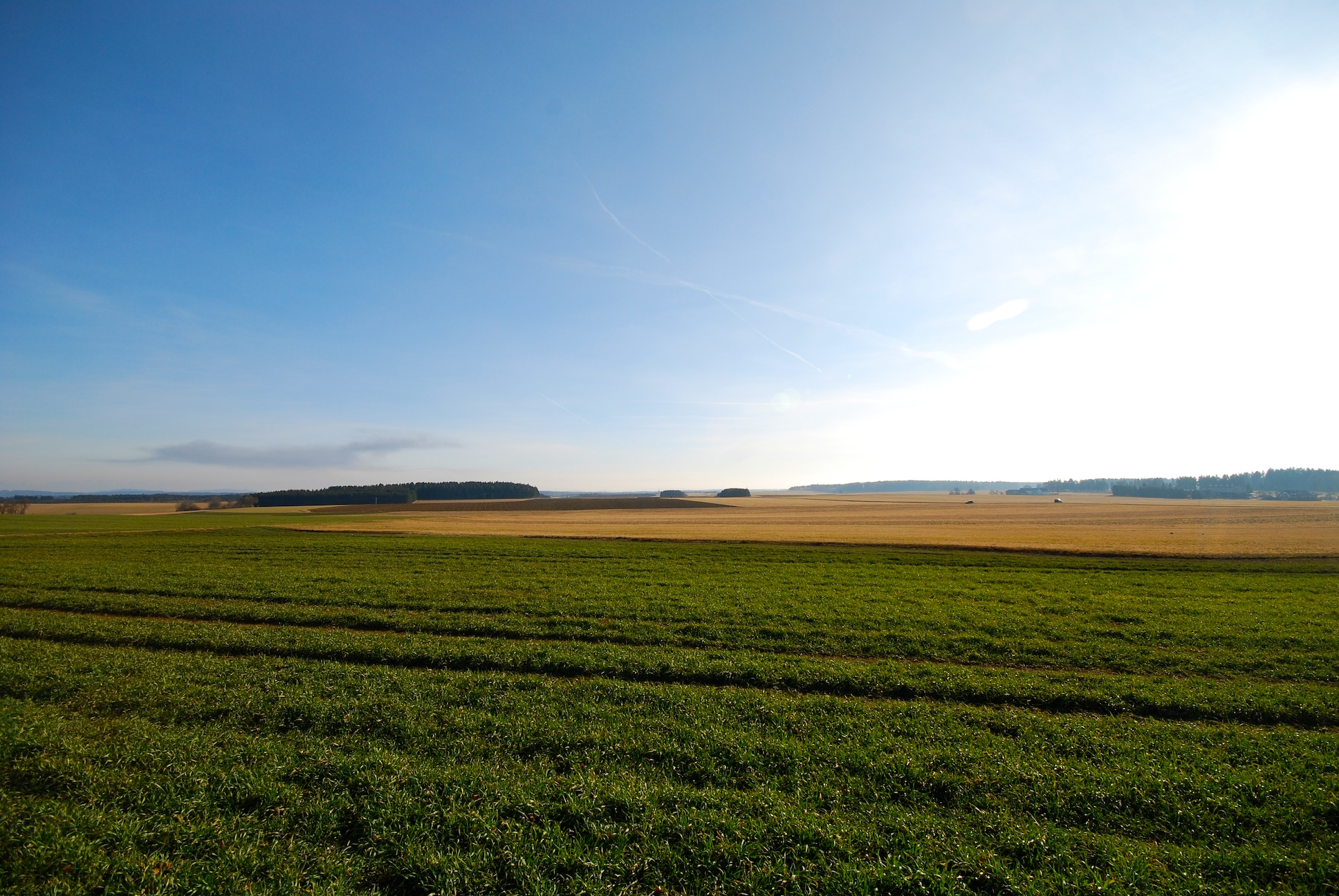 Hegaualb